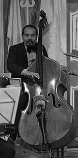 Frank Noya in de Nederlandse kinderserie De film van Ome Willem in 1981